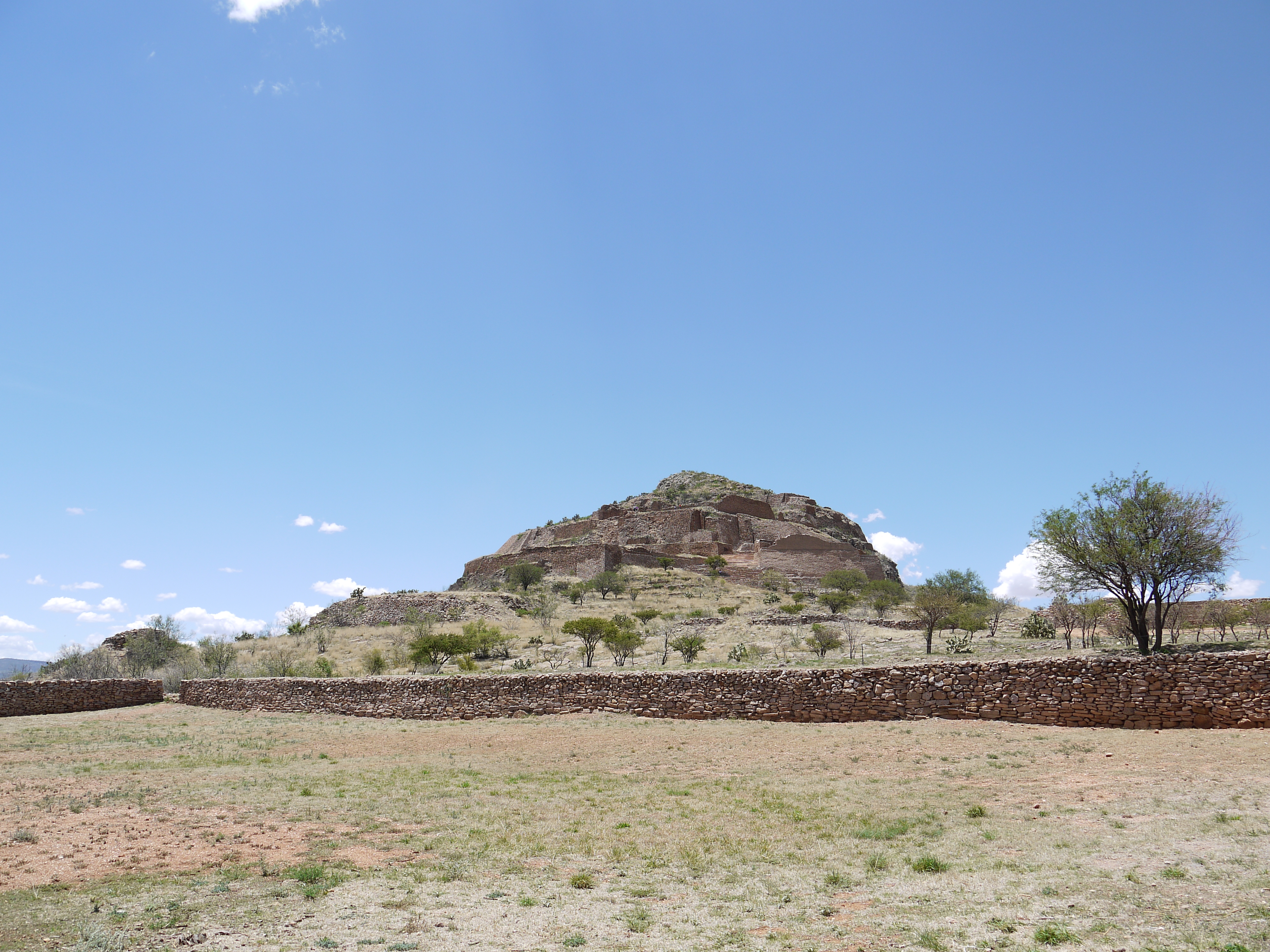 Vista General, La Quemada